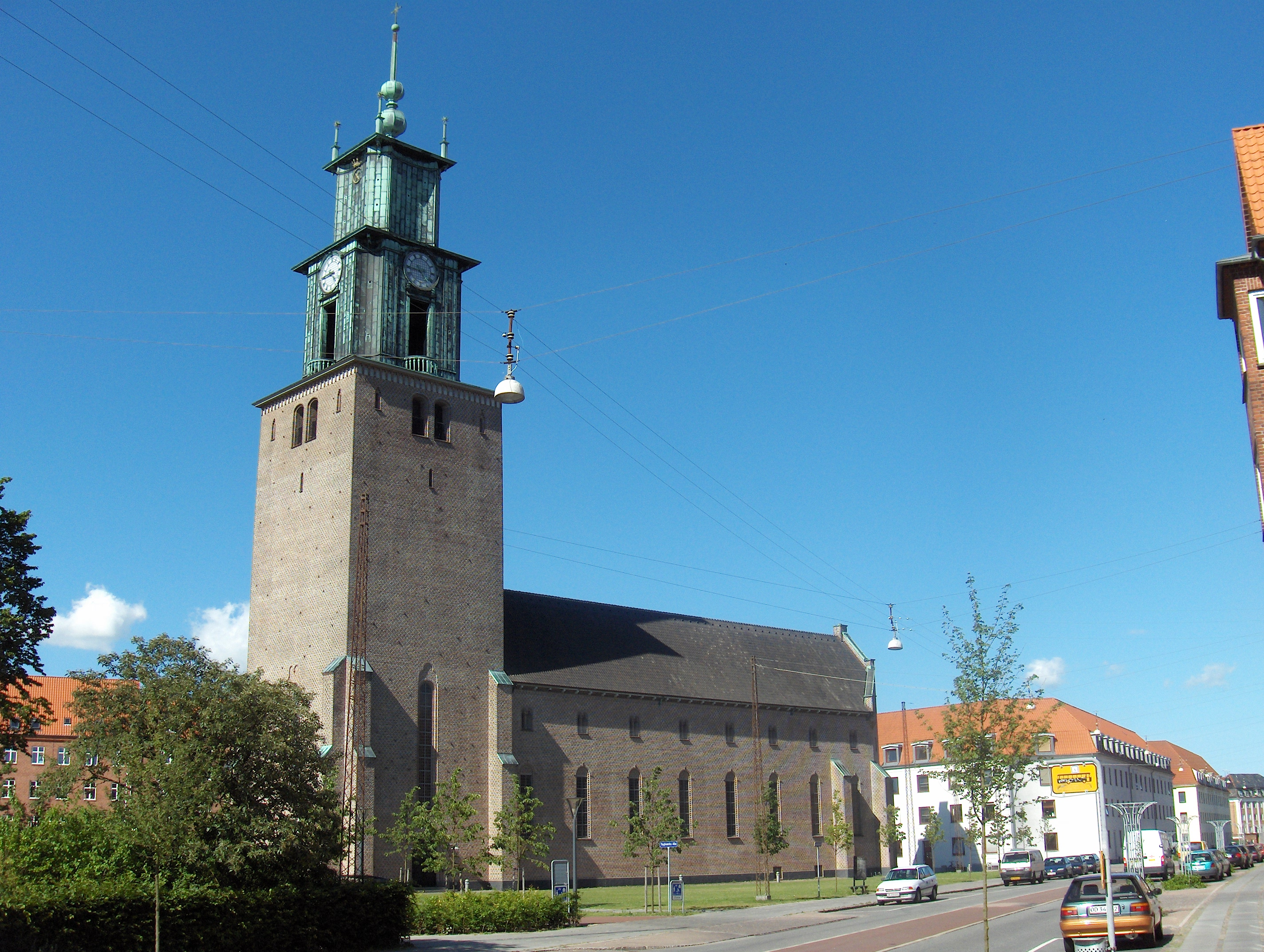 Sankt Markus Kirke i Aalborg